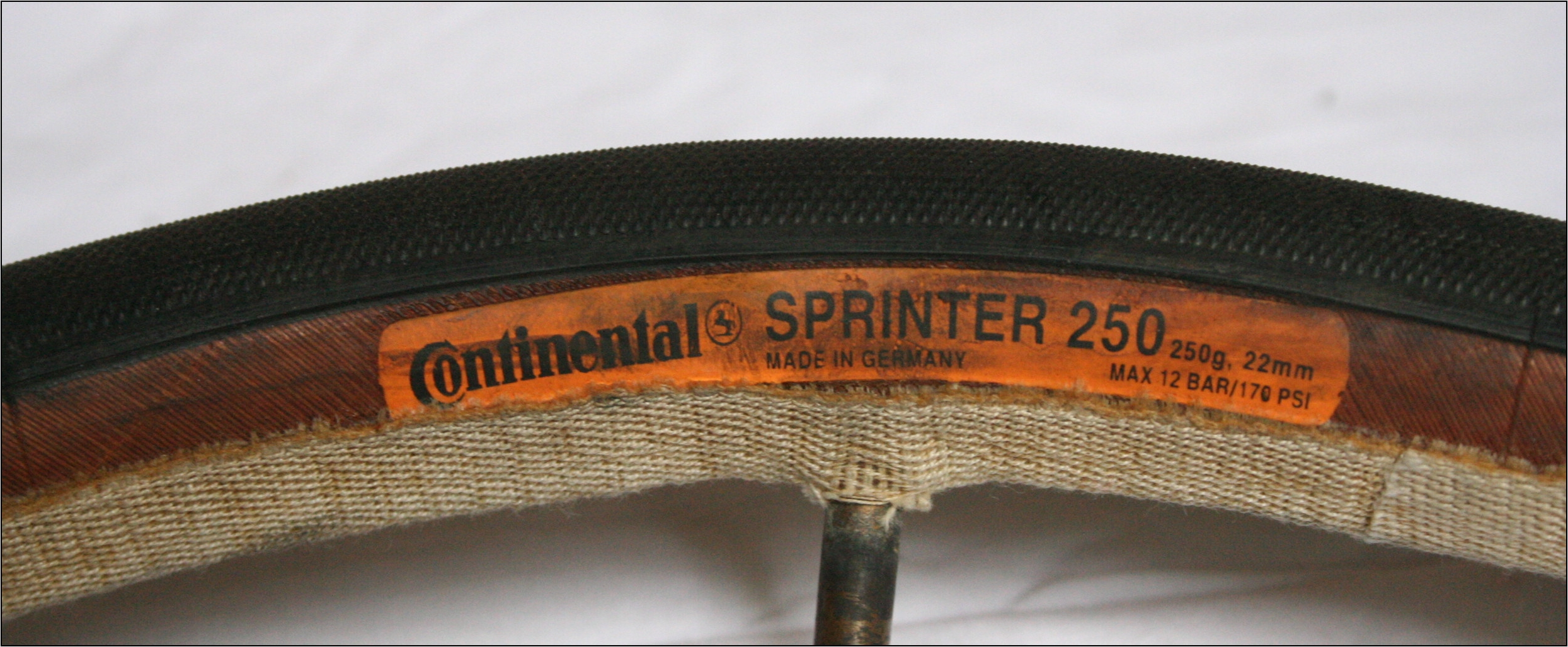 Conti Schlauchreifen "Sprinter 250"